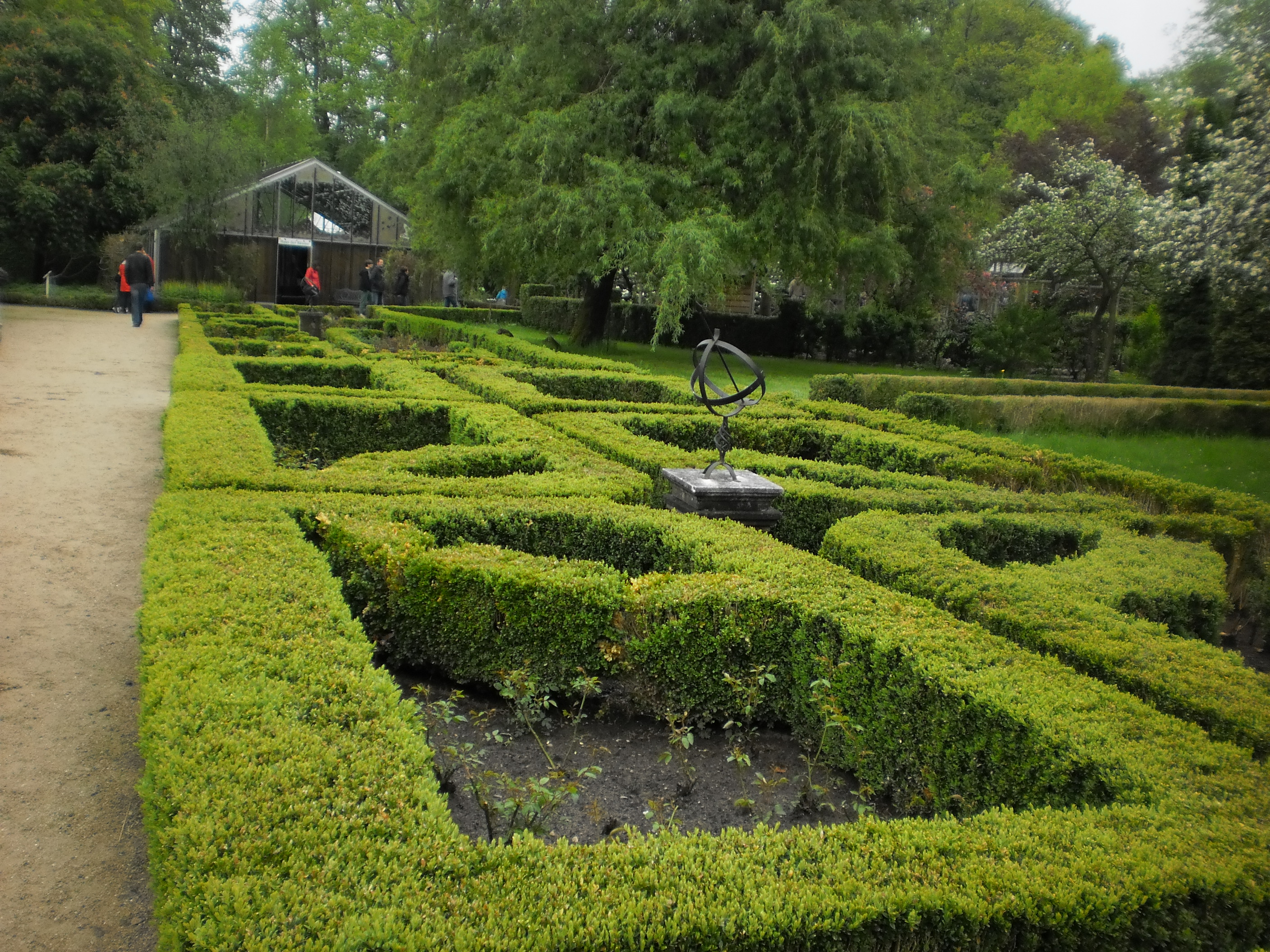 Garten der Schmetterlinge und Schlosspark in Friedrichsruh-Aumühle